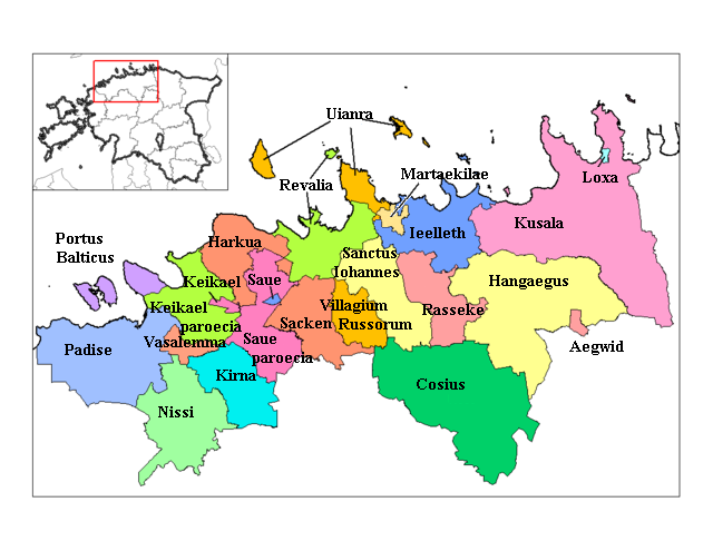 Harriae municipia Latine